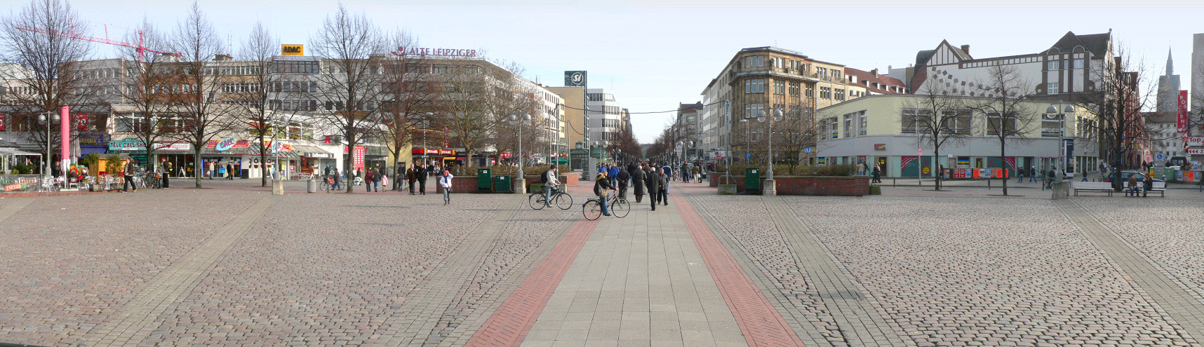 Steintor Hannover